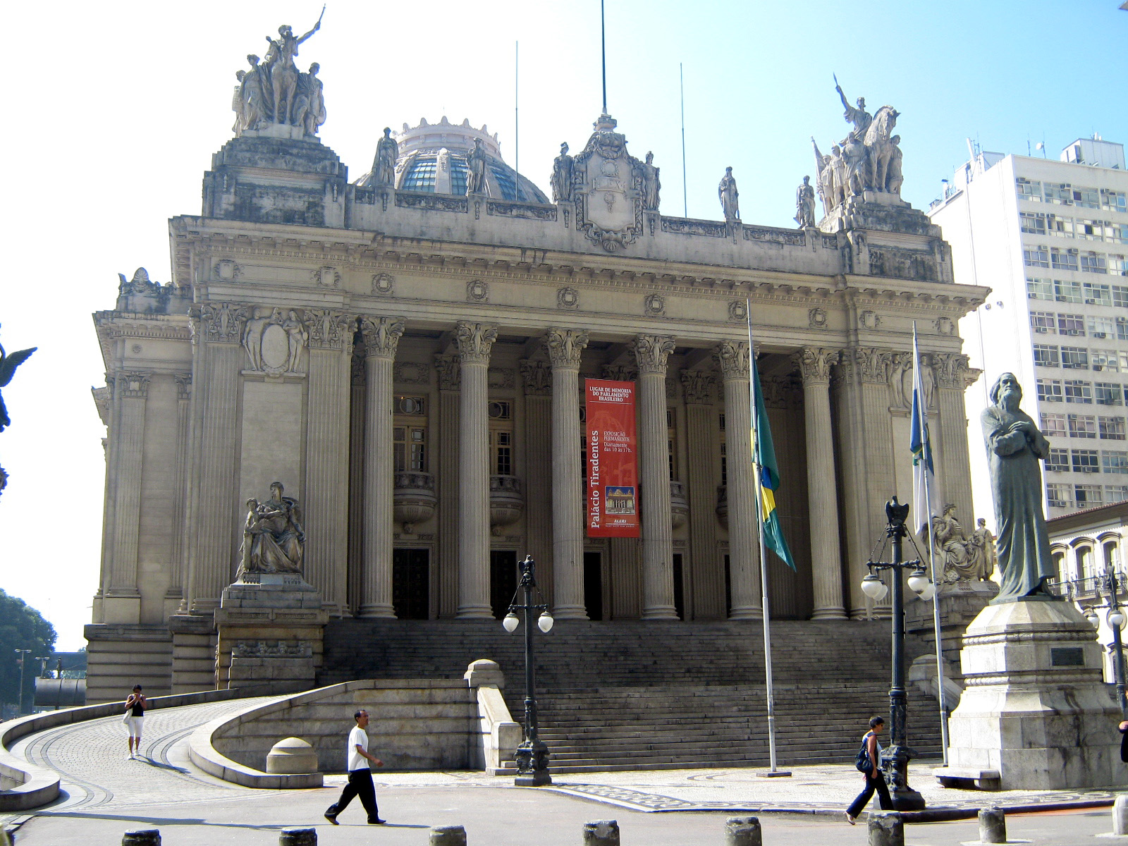 Palácio Tiradentes in Rio de Janeiro, Brazil